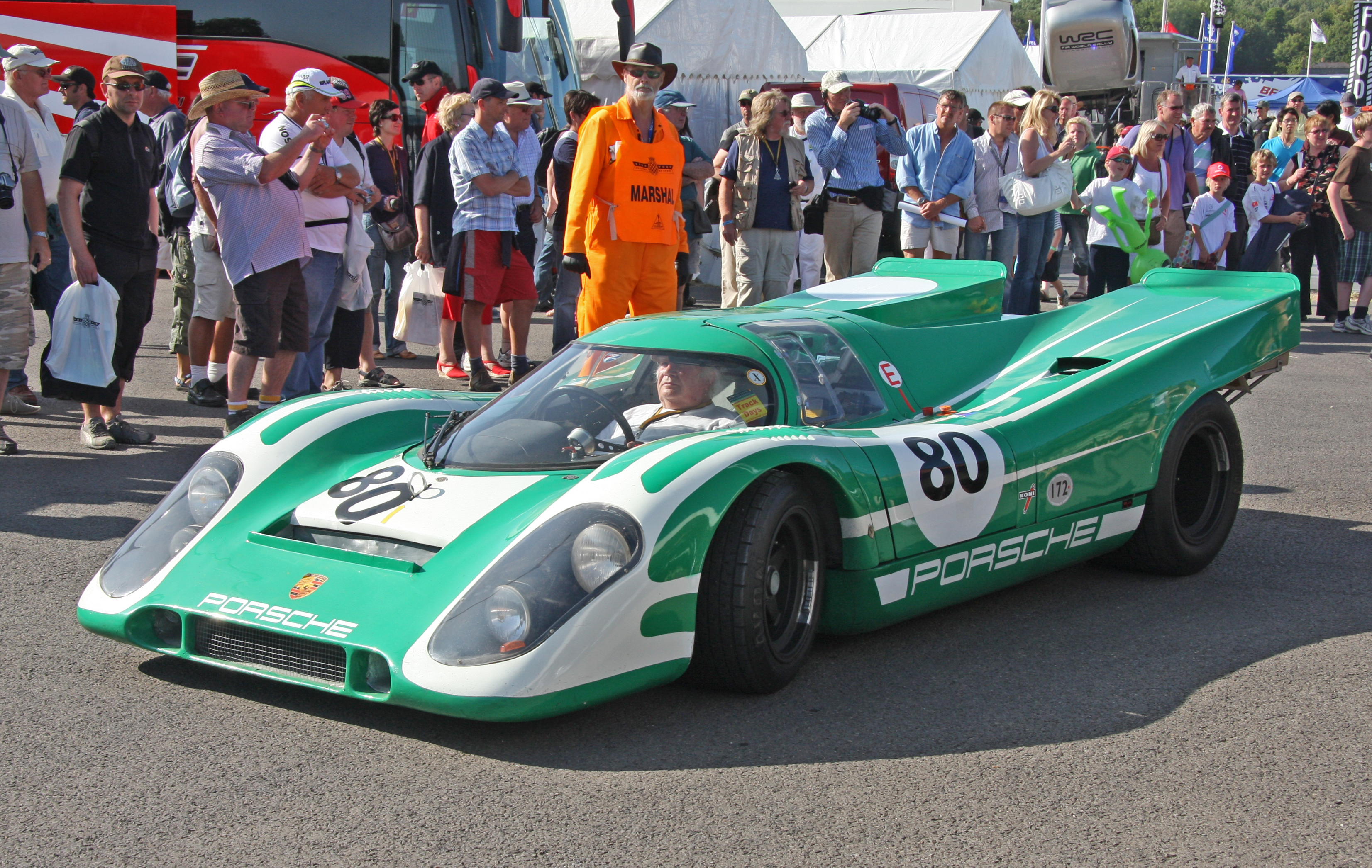 1969 Porsche 917K